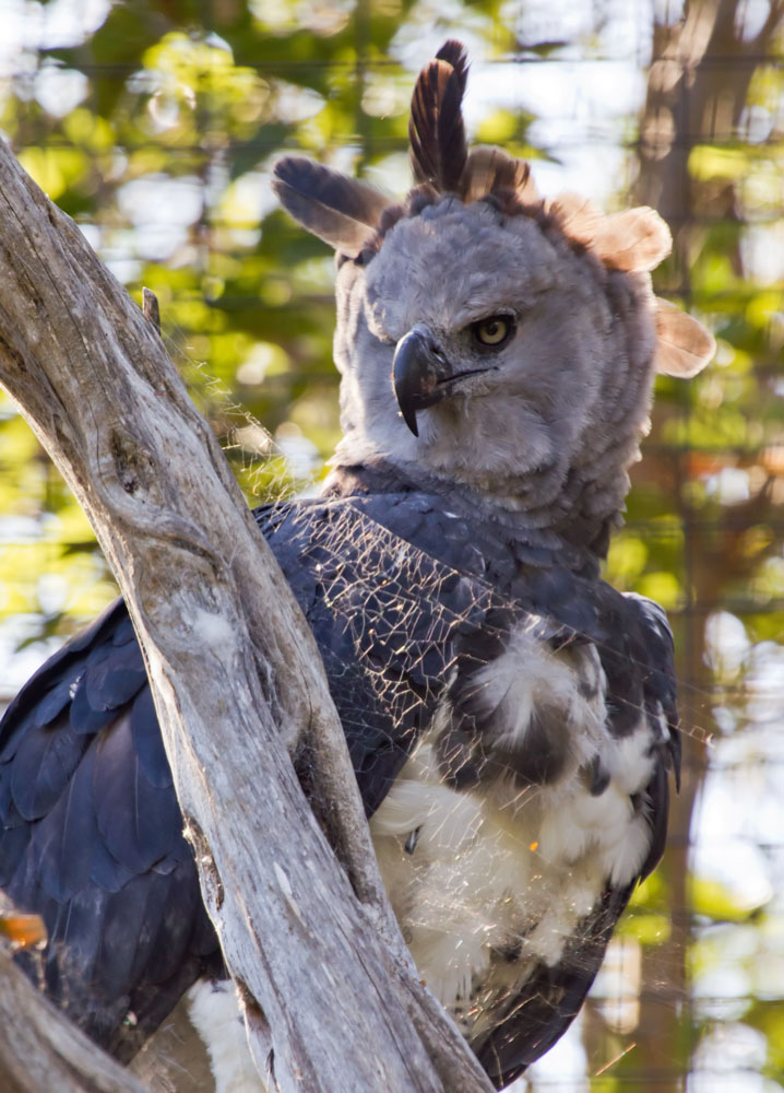 San Diego Zoo (2011)